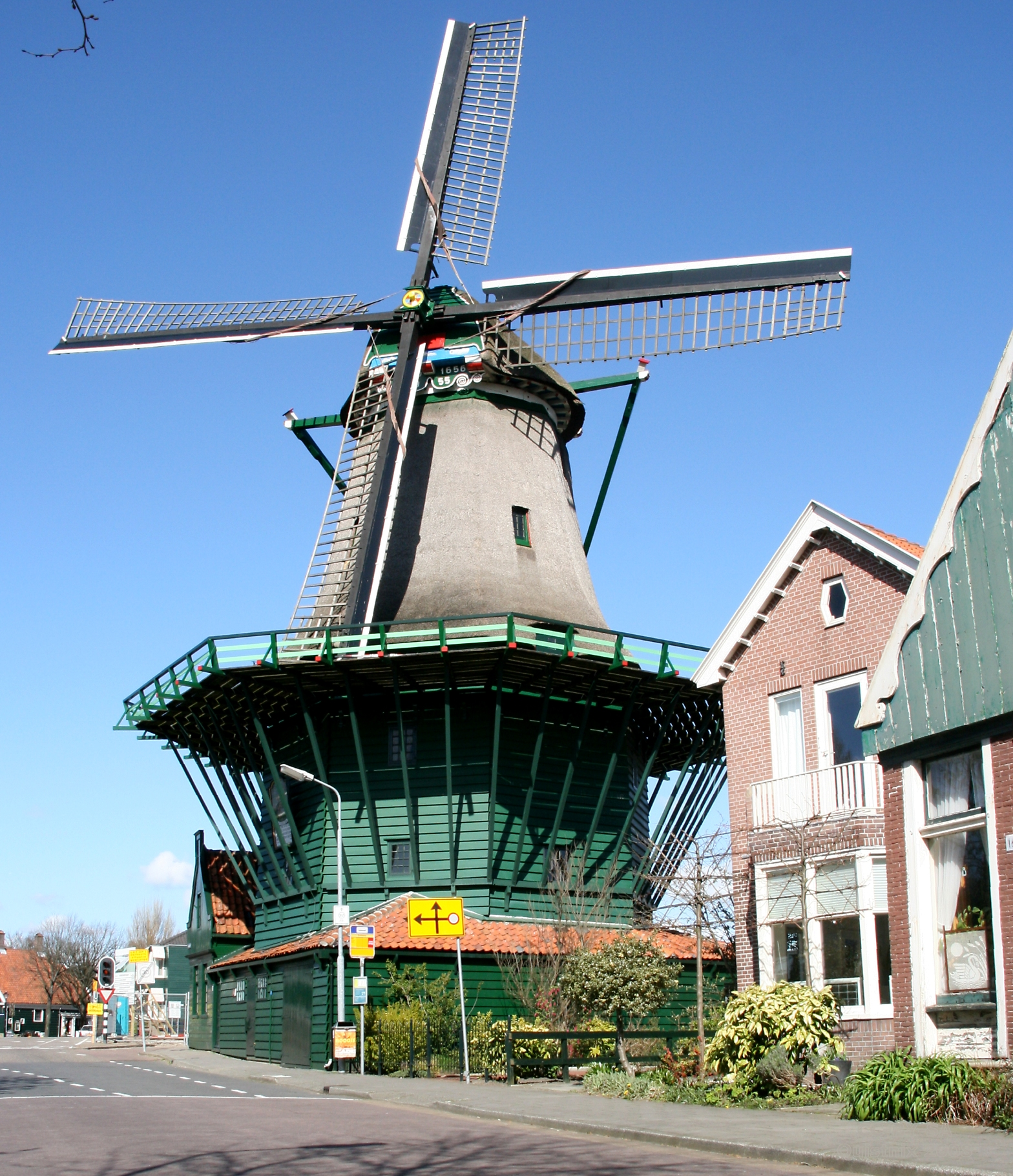 Zaandijk: Korenmolen de Bleeke Dood, gezien vanaf de weg